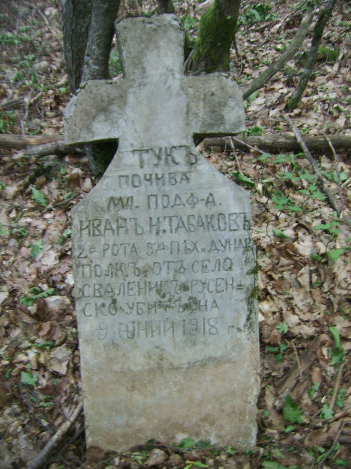 Паметник на мл. подофицер Иван Табаков от Пети дунавски полк под връх Яребична, Македония, 1918г.